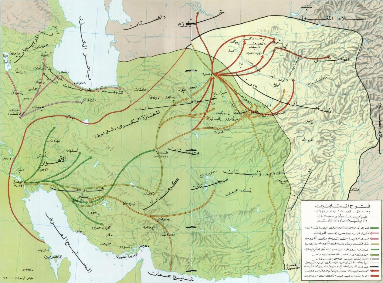 فُتُوح المُسلمين بعد معركة نهاوند سنة 21هـ المُوافقة لِسنة 641م في إيران وأرمينية وأذربيجان وما وراء النهر.